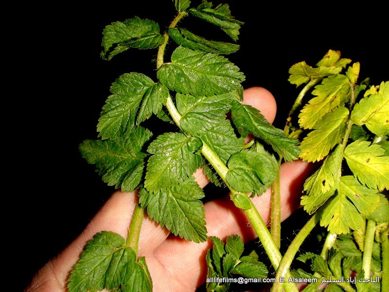 نباتات برّية سورية تؤكل